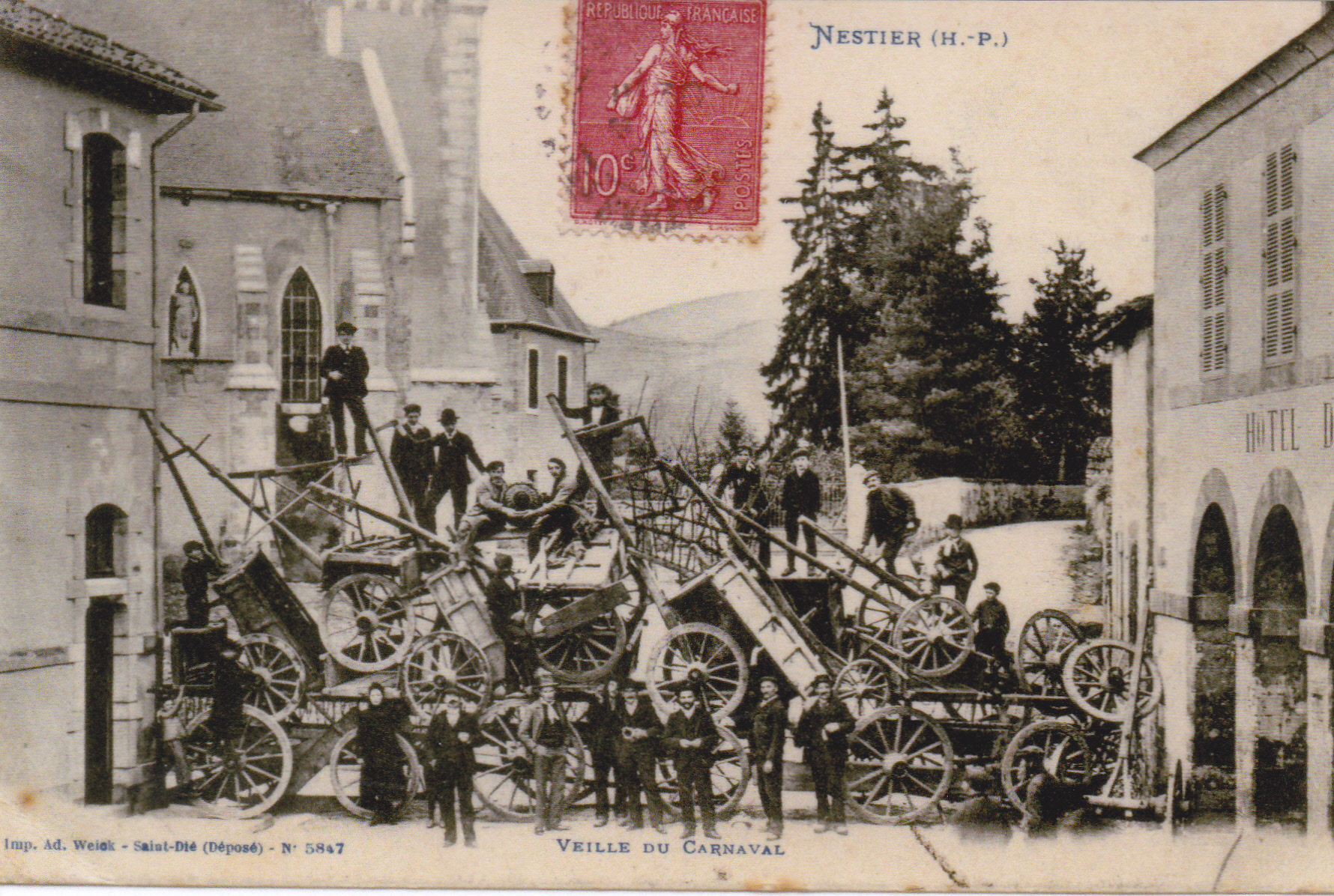 la barricade